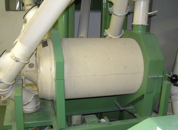 Trieur in einer Mühle; Separator in a grain-mill